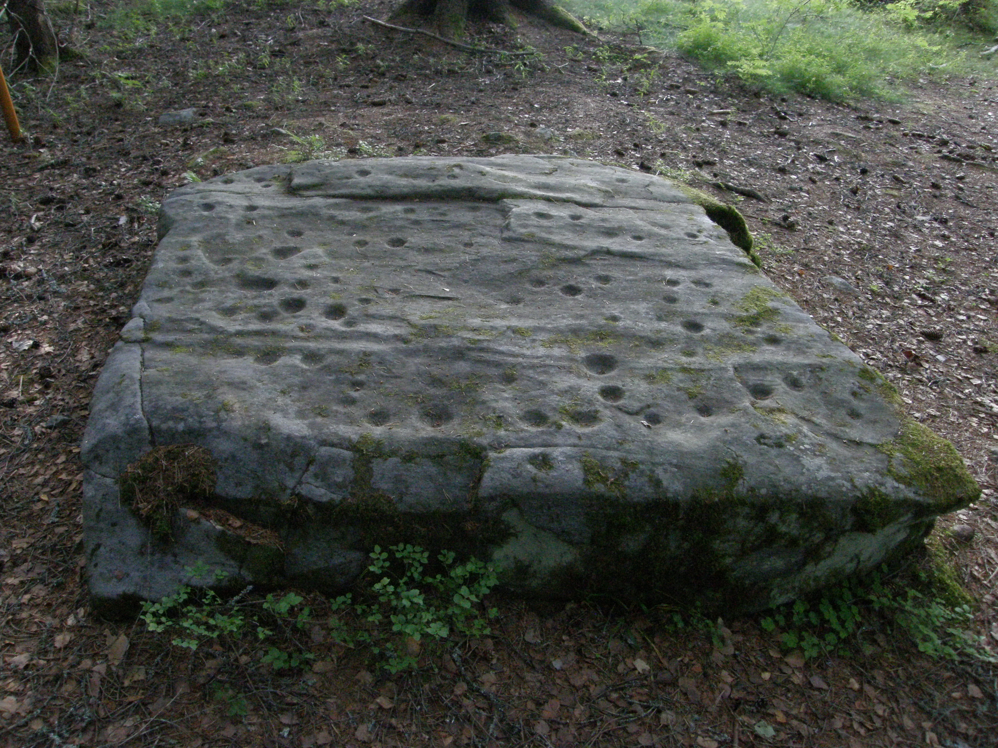 Pirunpöytä, kuppikivi Kesälahden Hummovaarassa